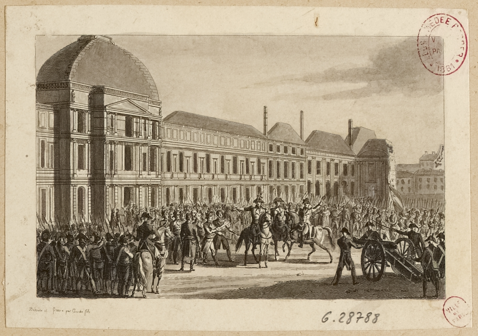 La Convention cernée par la Garde nationale et les sections parisiennes.